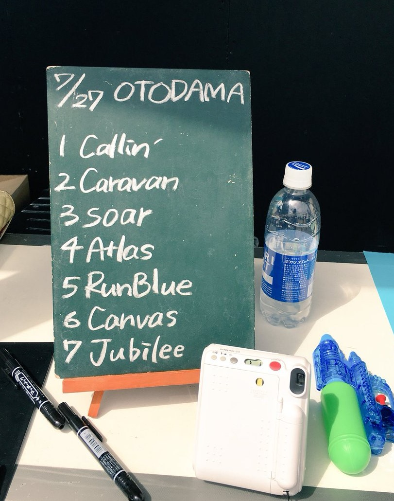 amiinAセトリボード(20180727(1))